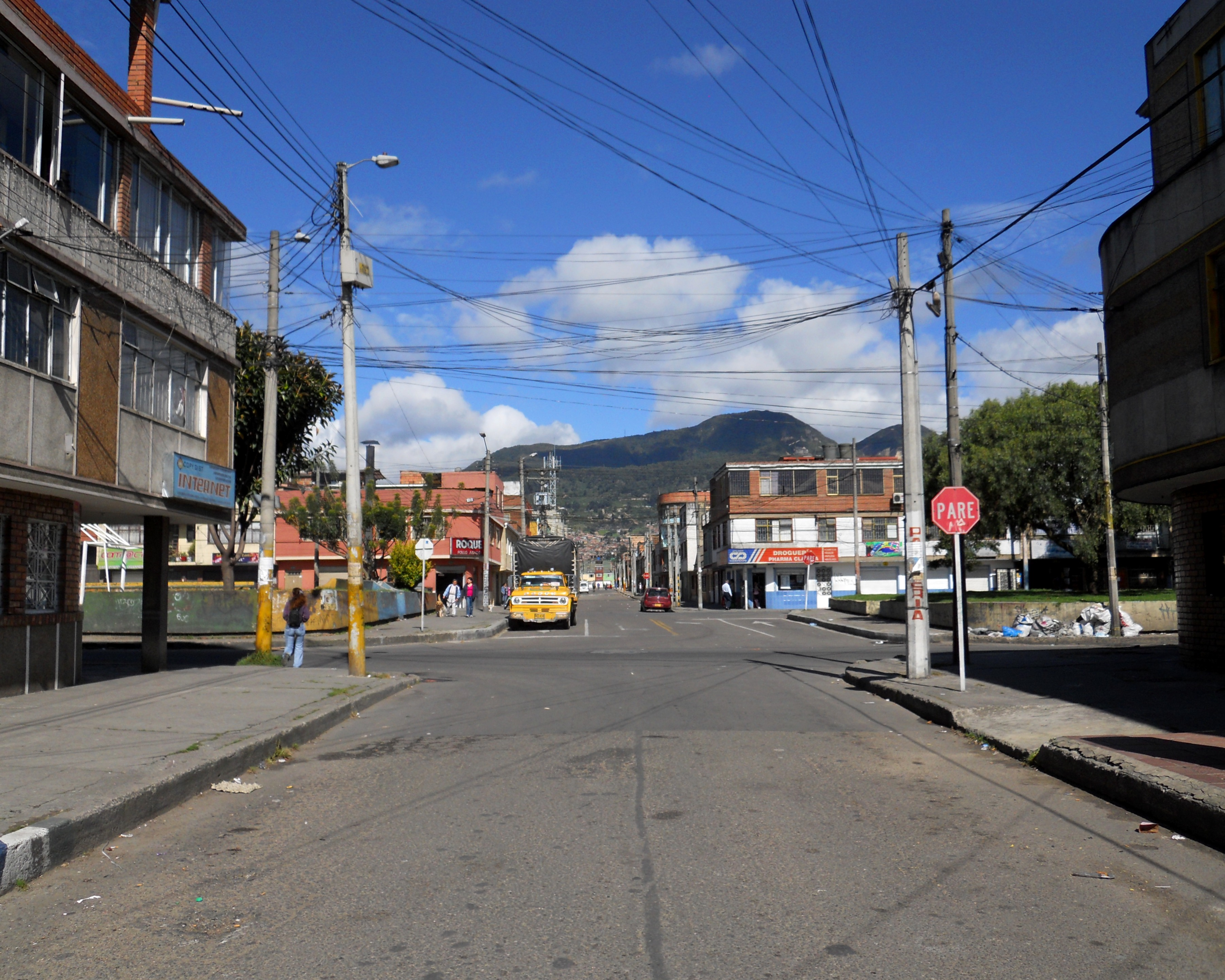 Bogotá calle 24 Sur con carrera 13 bis. Barrio San José Sur, localidad Antonio Nariño.